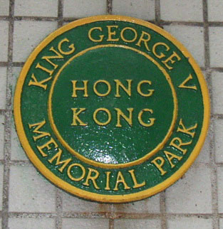 香港佐治五世紀念公園 King George V Memorial Park, Sai Ying Pun, Hong Kong